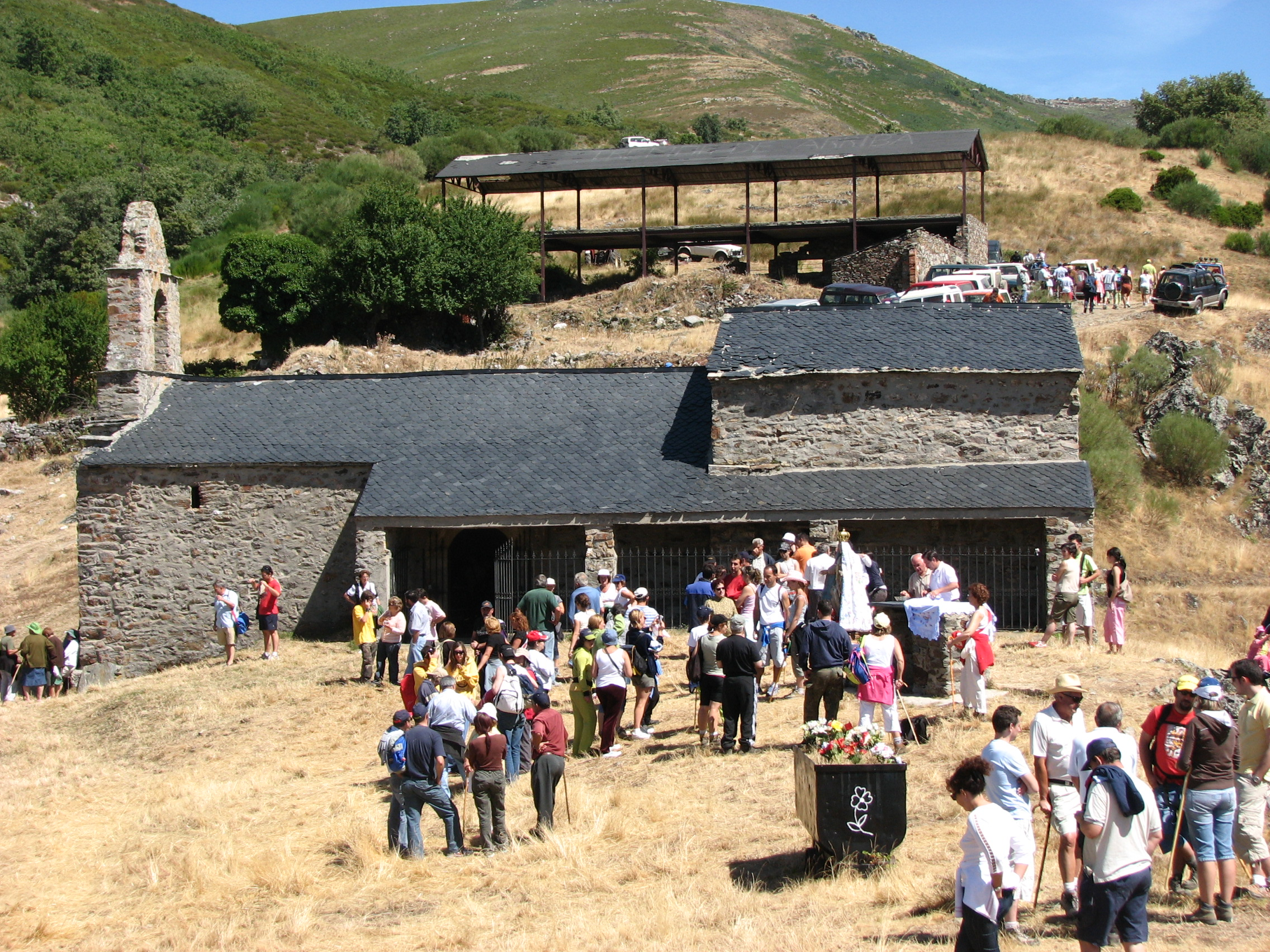 Vegapujín, León, España. Romería de la Virgen de la Casa.